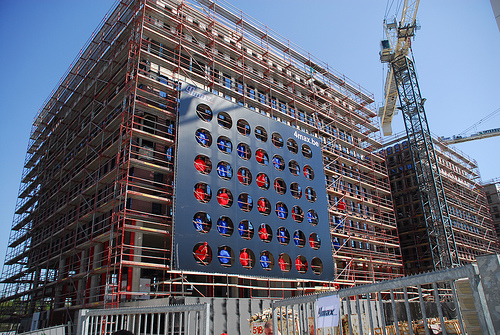 4max